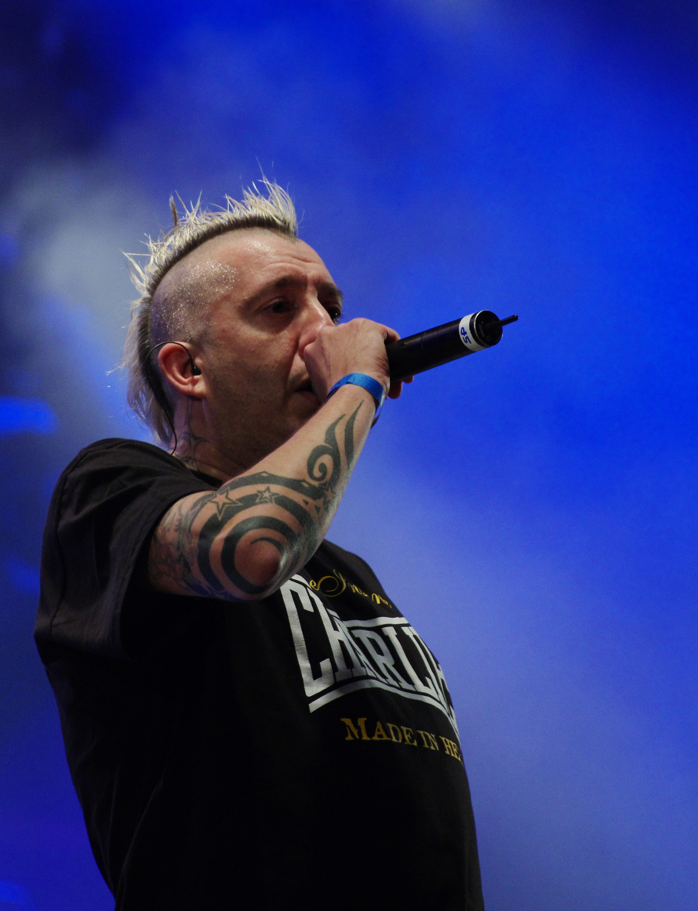 Ska-P beim Ruhrpott Rodeo 2013. Besetzung: Roberto Gañán Ojea (Pulpul) (Gesang, Rhythmus-Gitarre); Ricardo Degaldo de la Obra (Pipi) (Showmaster, Zweitstimme); José Miguel Redín Redín (Joxemi) (Lead-Gitarre); Julio César Sánchez (E-Bass); Alberto Javier Amado (Kogote) (Keyboard); Luis Miguel García (Luismi ) (Schlagzeug, Perkussion); Garikoitz Badiola (Gari) (Posaune); Alberto Iriondo (Txikitin) (Trompete)